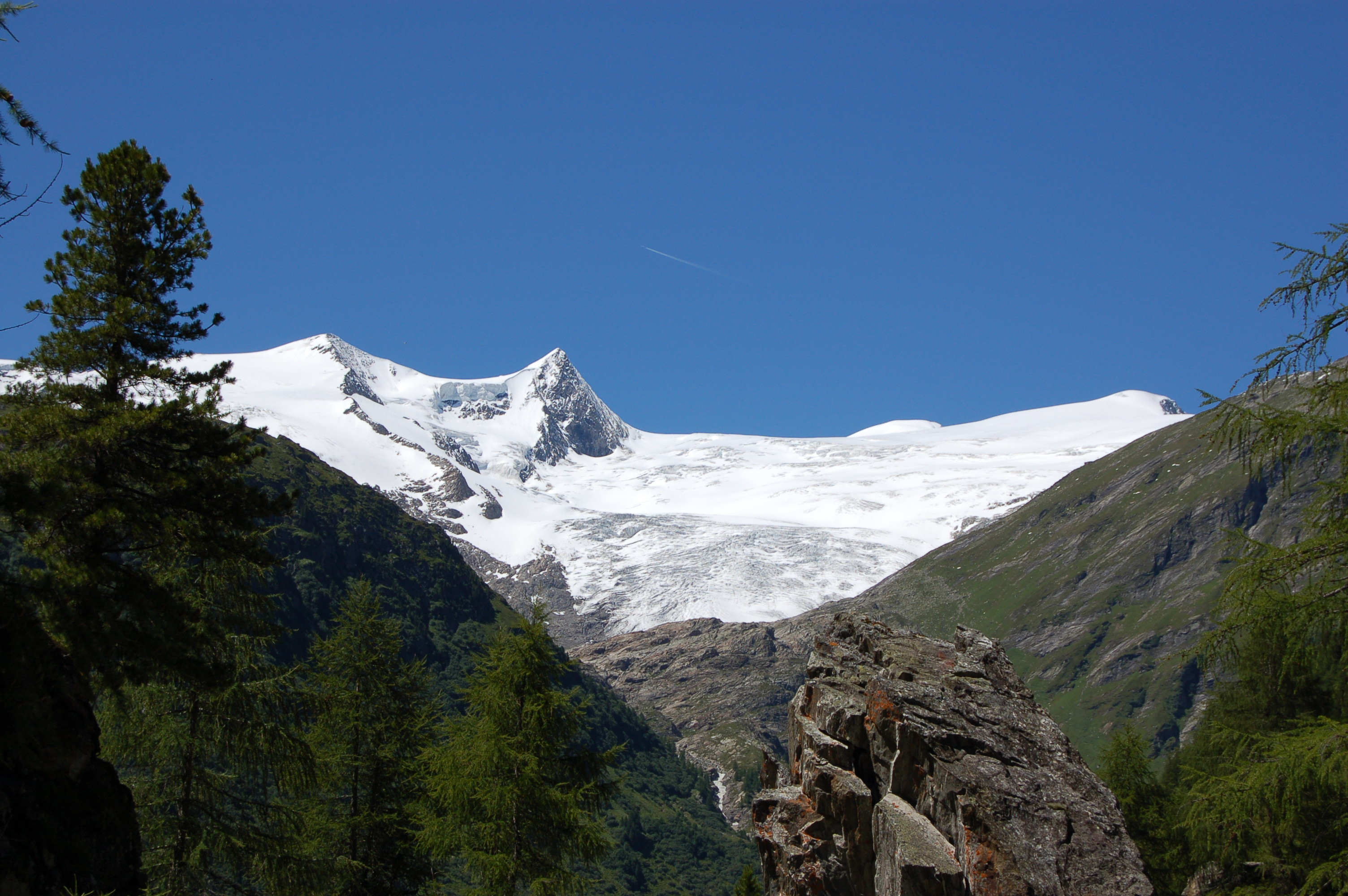 Venedigergruppe gesehen vom Gschößtal. Von links nach rechts Hiher Zaun, Schwarze Wand, Groß- und Kleinvenediger. This file shows the National Park Hohe Tauern in Austria.